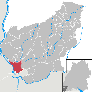 Weil am Rhein, Landkreis Lörrach, Baden-Württemberg